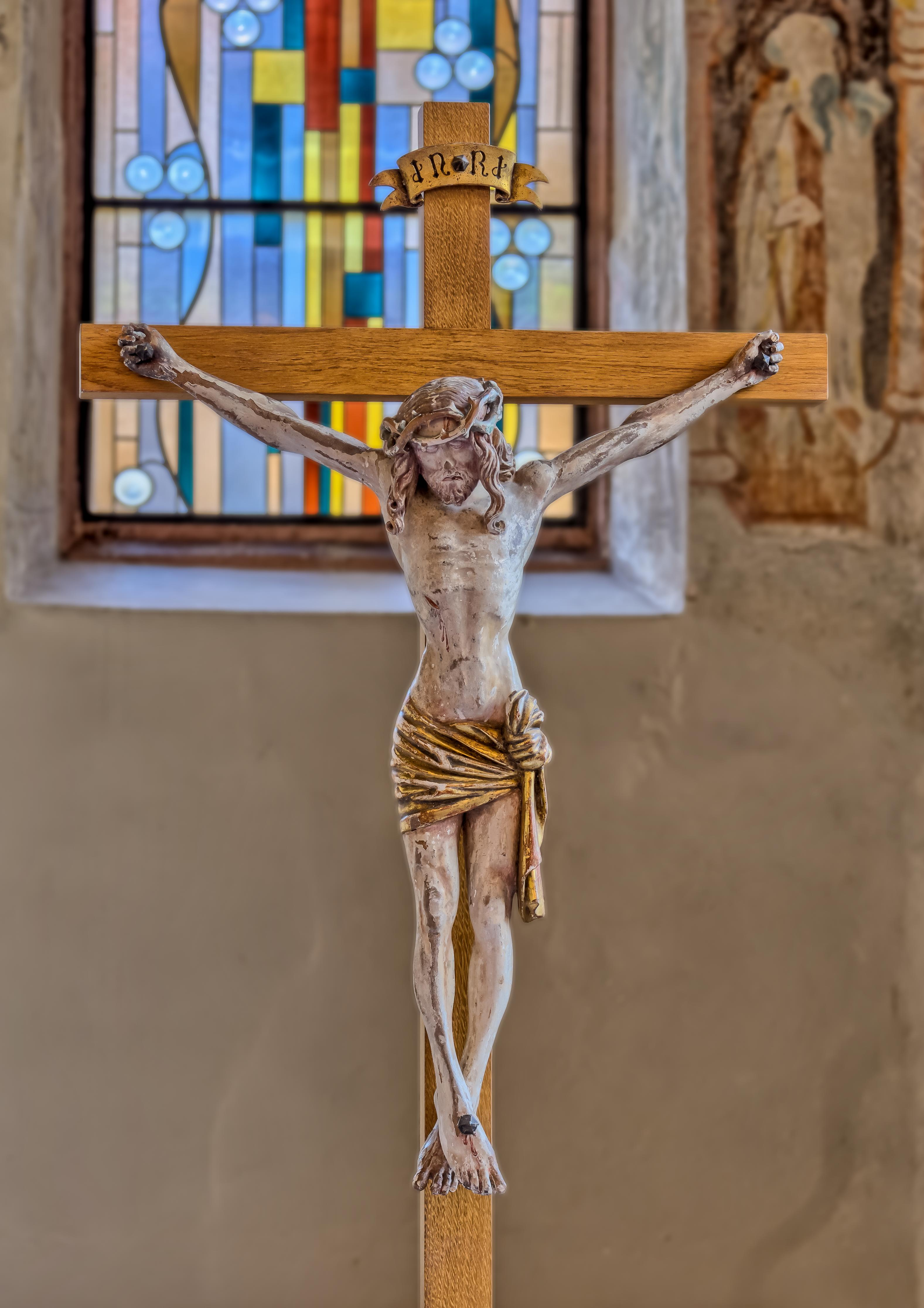 Bilder von St. Laurentius in Bischoffingen Spätgotisches Kruzifix